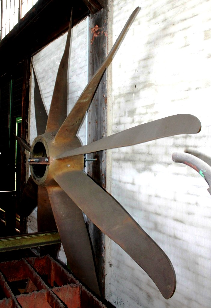 Grim`sche Leitrad